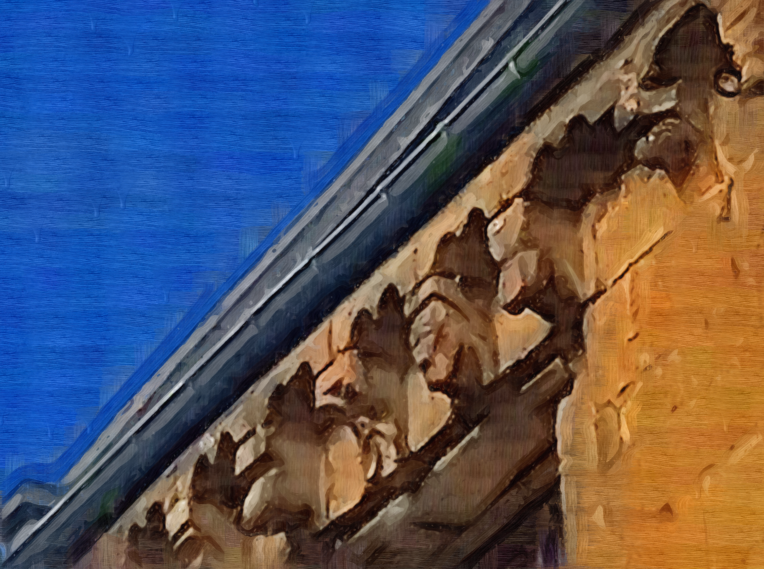 Animalistic faces in the Romanesque style on the eves of the old abbay.